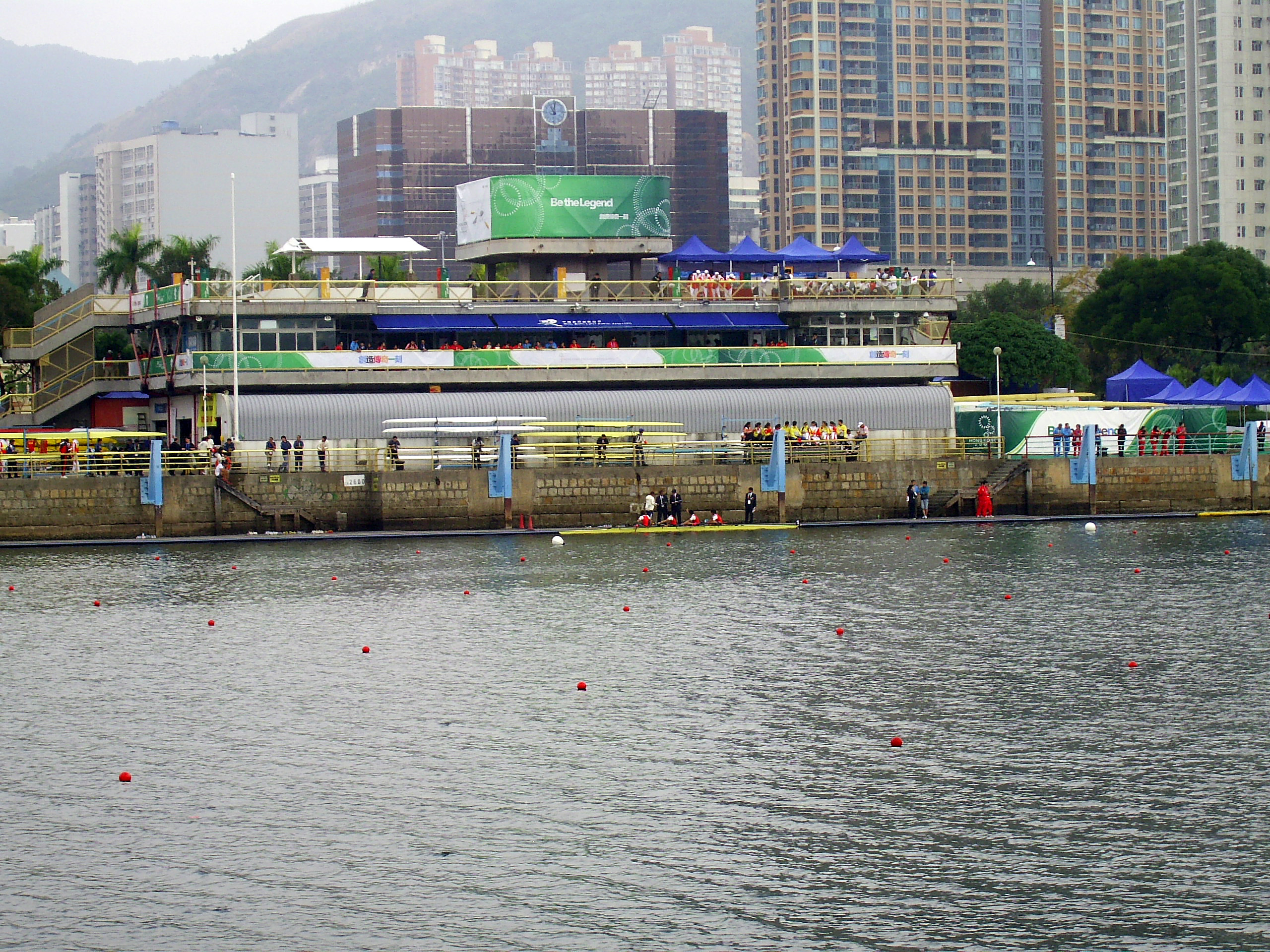 中文（香港）: 沙田賽艇中心